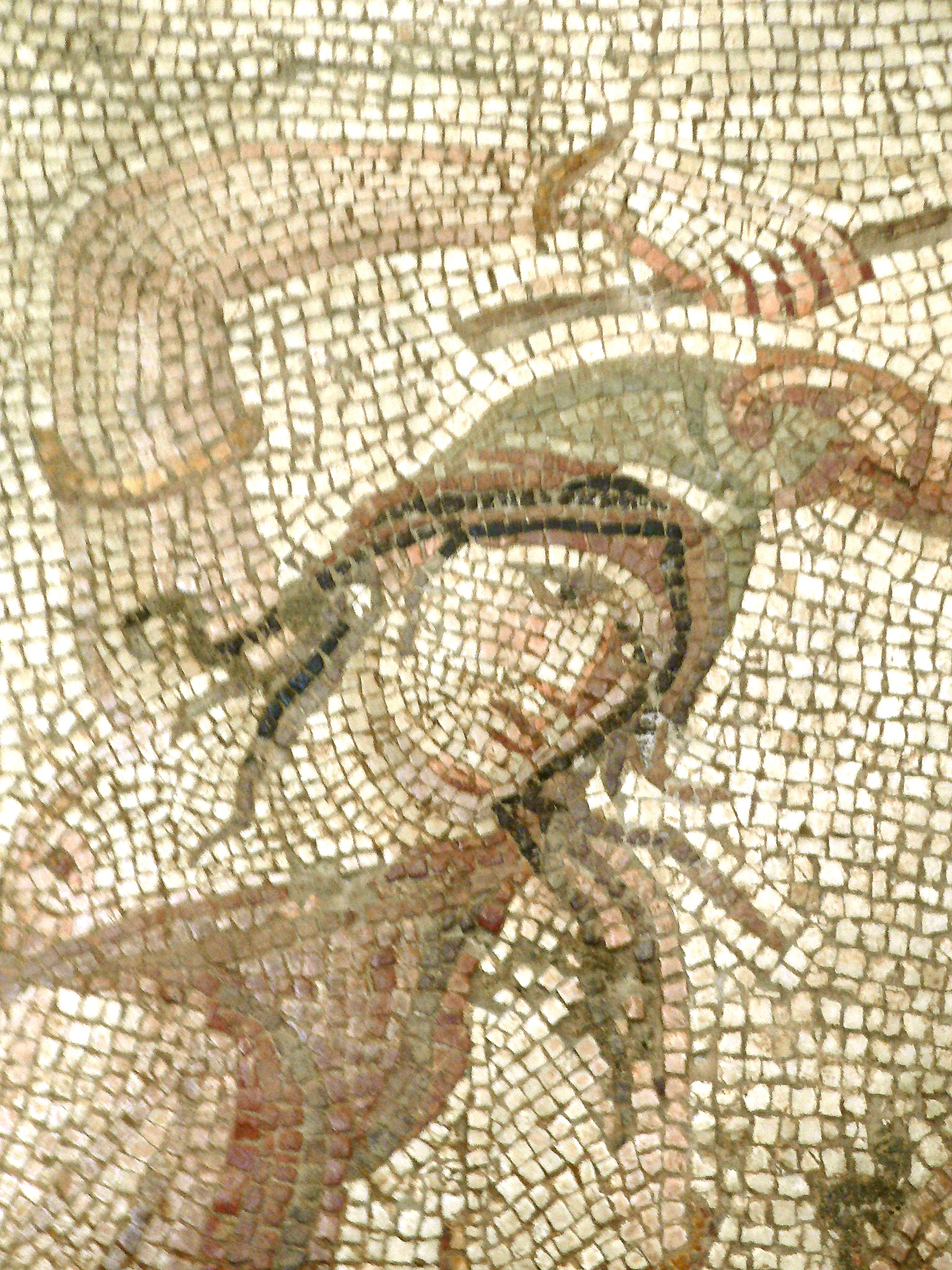 Amazonomachie, détail, 2ème moitié du IV° s. ap. J.-C., Turquie, Daphné (faubourg d'Antioche sur l'Oronte, actuelle Antakya), fragment de mosaïque de pavement, marbre et calcaire.